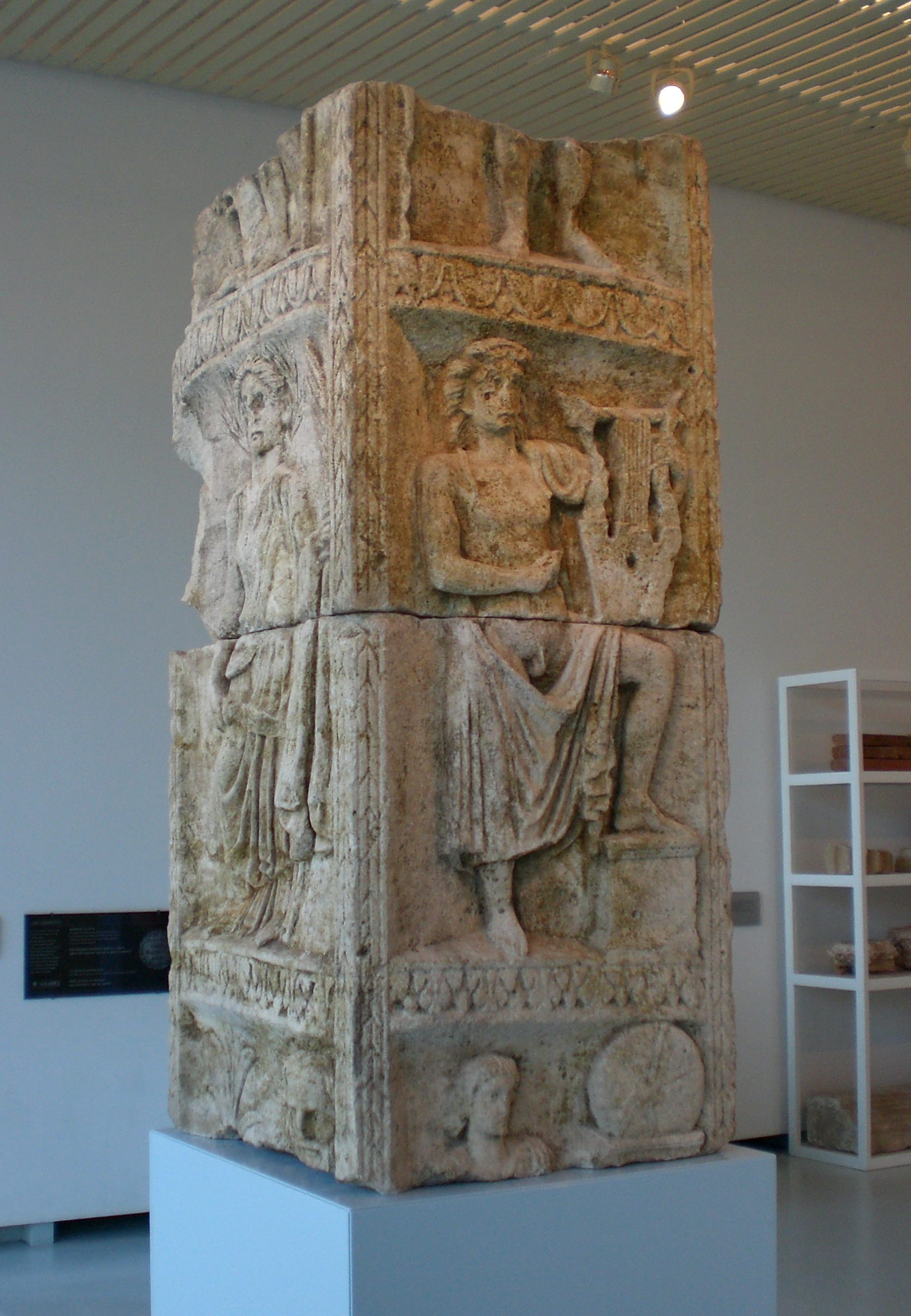 Godenpijler, Museum Het Valkhof, Nijmegen. Museum Het Valkhof Native nameMuseum Het ValkhofLocationNijmegen AddressKelfkensbos 596511 TB NijmegenNetherlandsCoordinates51° 50′ 47″ N, 5° 52′ 16″ E Established1999 Web page control : Q1127079 VIAF: 158715438 ISNI: 0000 0004 0533 6734 LCCN: no2002025807 GND: 5519052-2 SUDOC: 075891700 WorldCat institution QS:P195,Q1127079